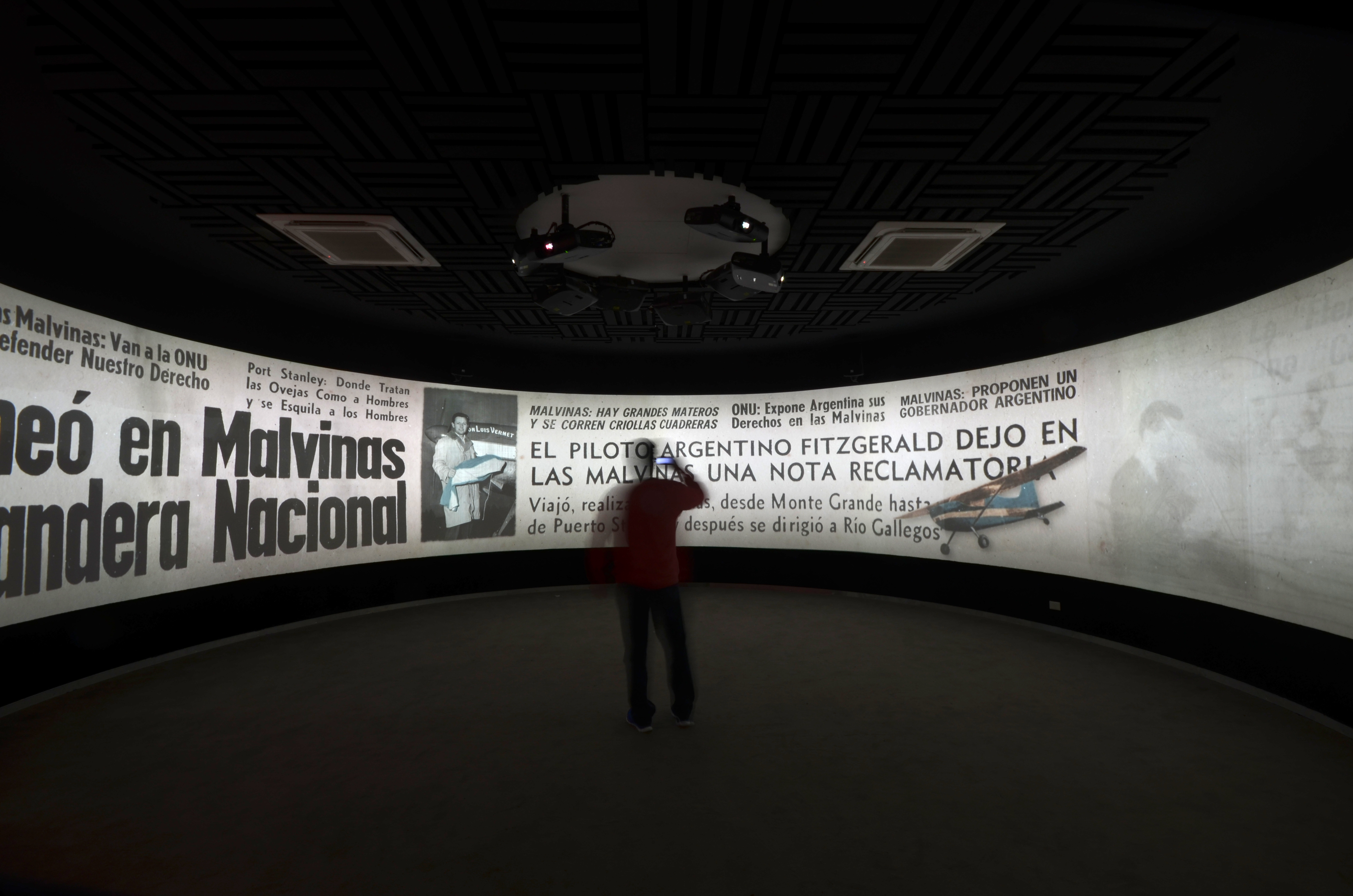 10 de diciembre de 2014.- Museo Malvinas e Islas del Atlántico Sur Foto: Luis Abregú y Camila Cersósimo